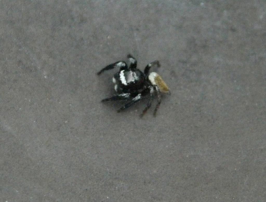 2008/10/25 和歌山県田辺市：Tanabe City. Wakayama Pref. Japan